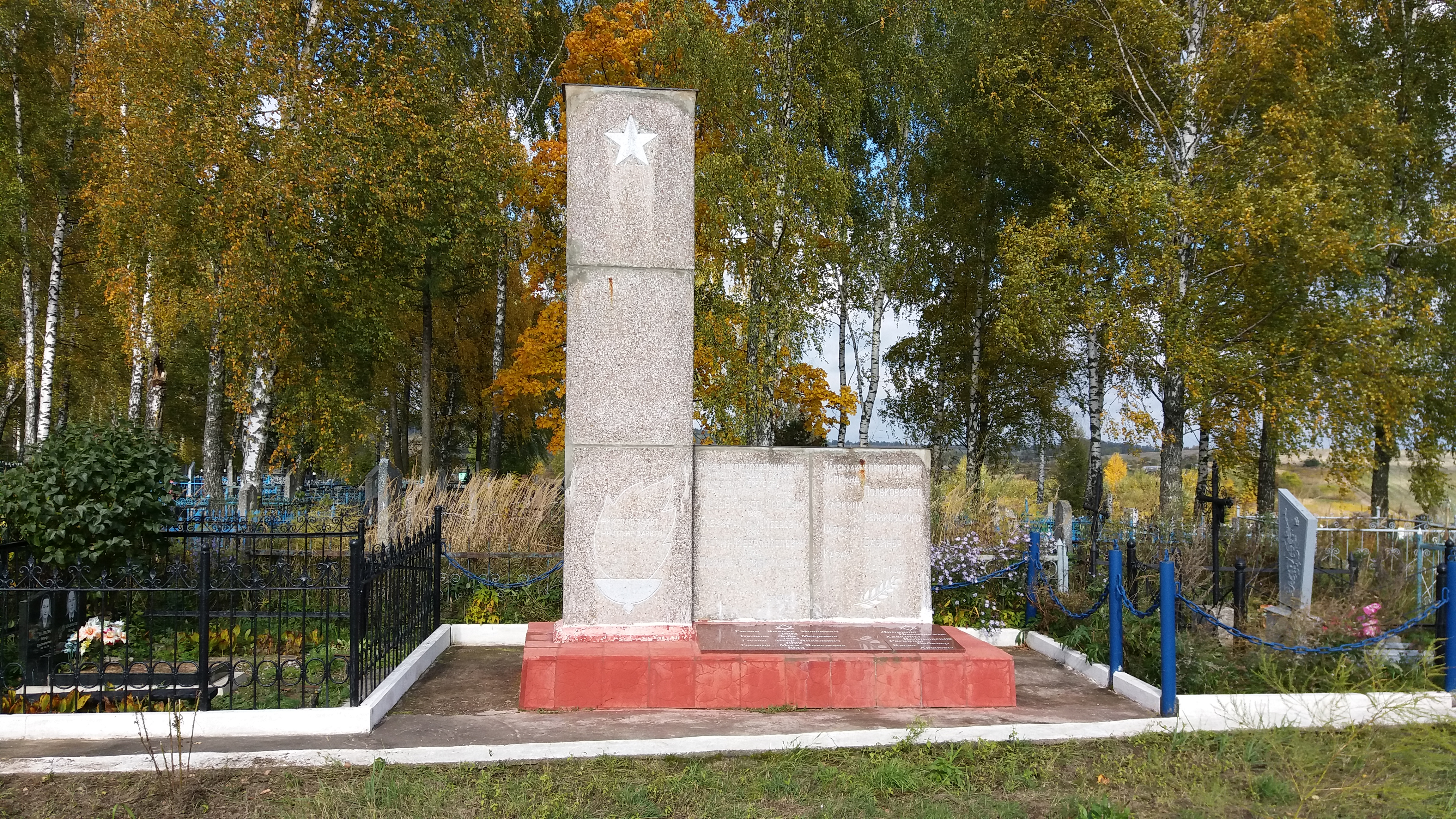 Памятник на месте убийства нацистами 8 апреля 1942 года евреев - узников гетто города Барань Оршанского района. Находится на территории городского кладбища недалеко от входа, в 300 метрах от улицы Сорокина.